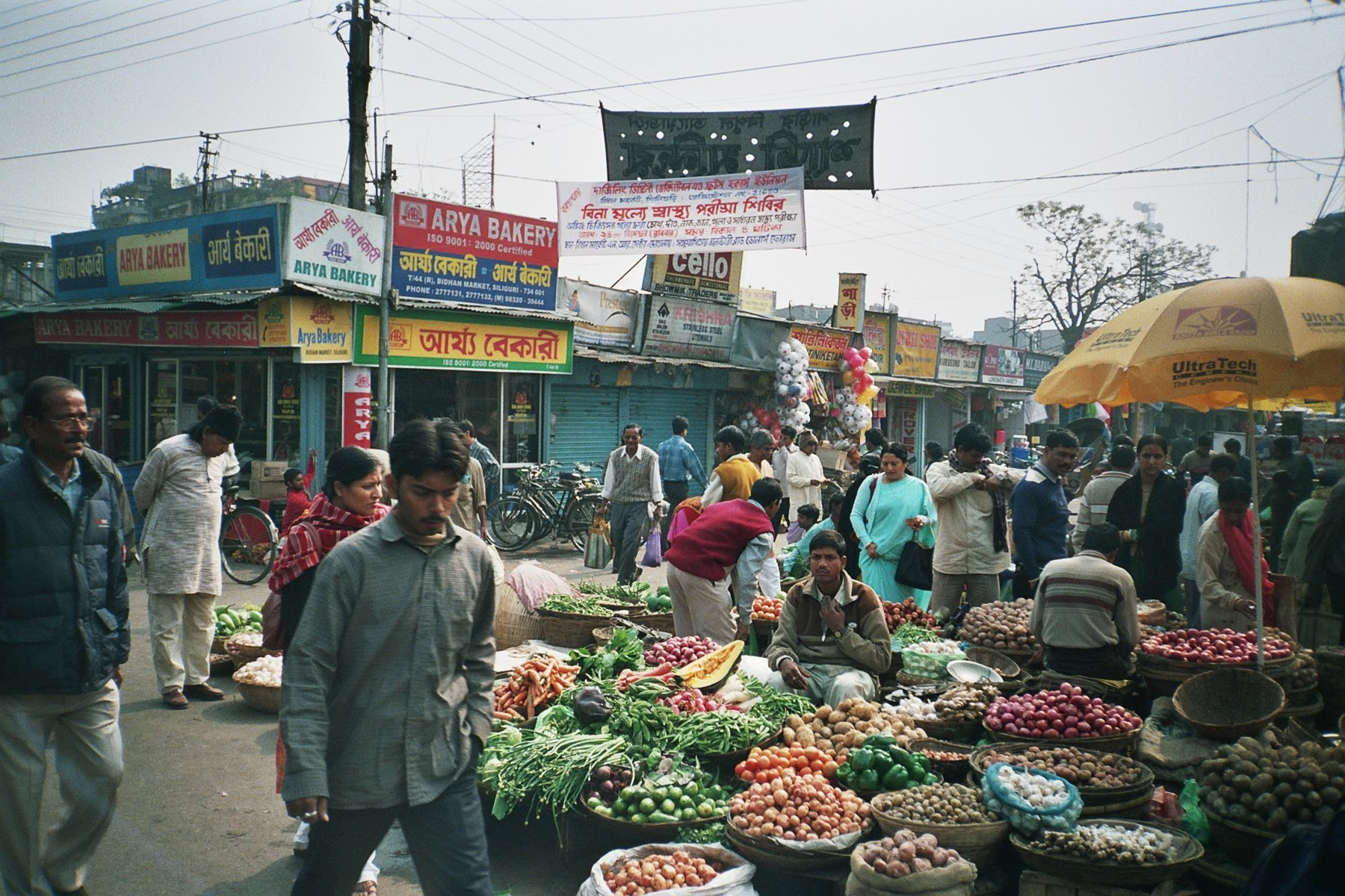 Bidhan Market, Siliguri, West Bengal, India.